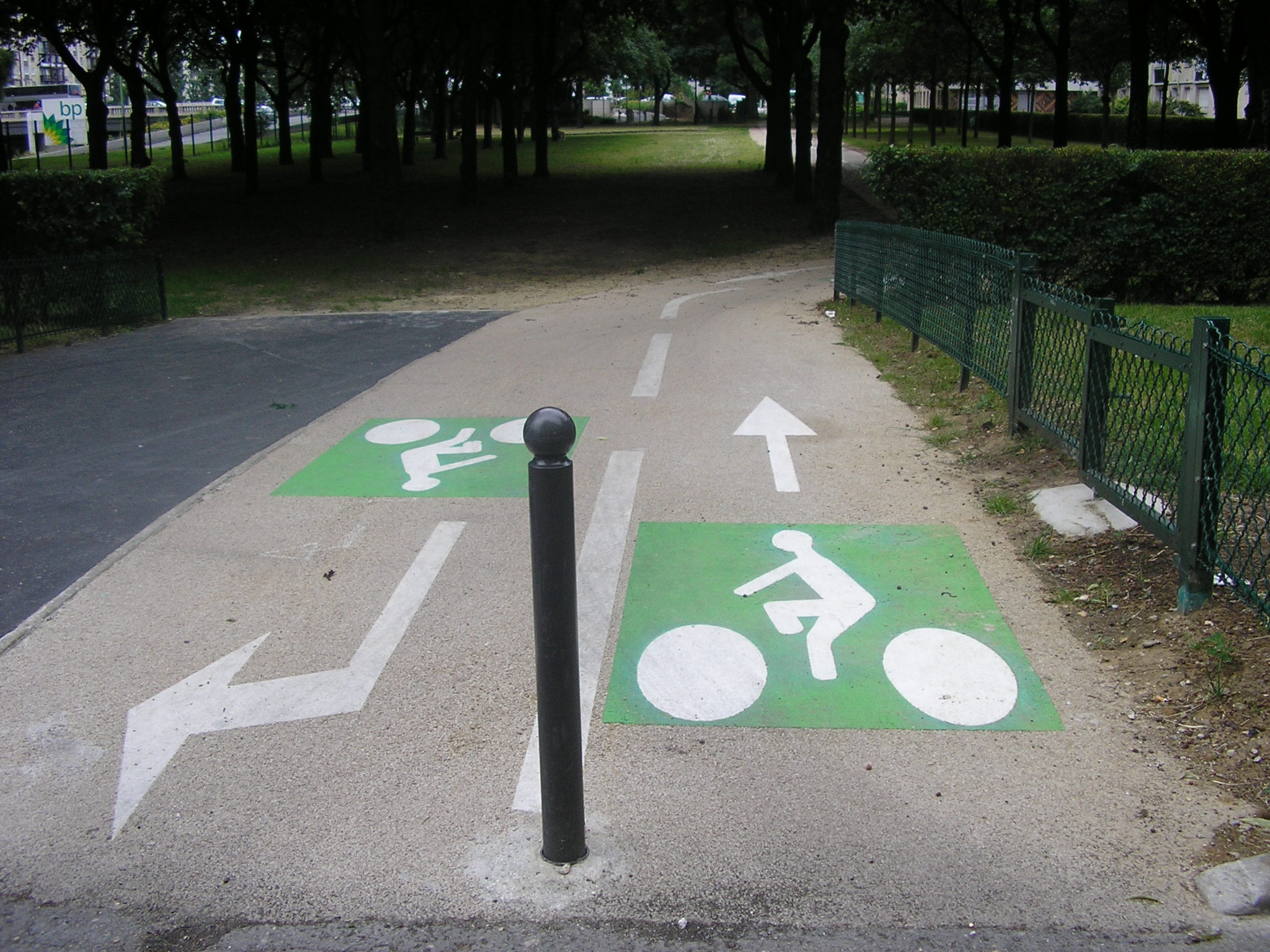 couloir cycliste